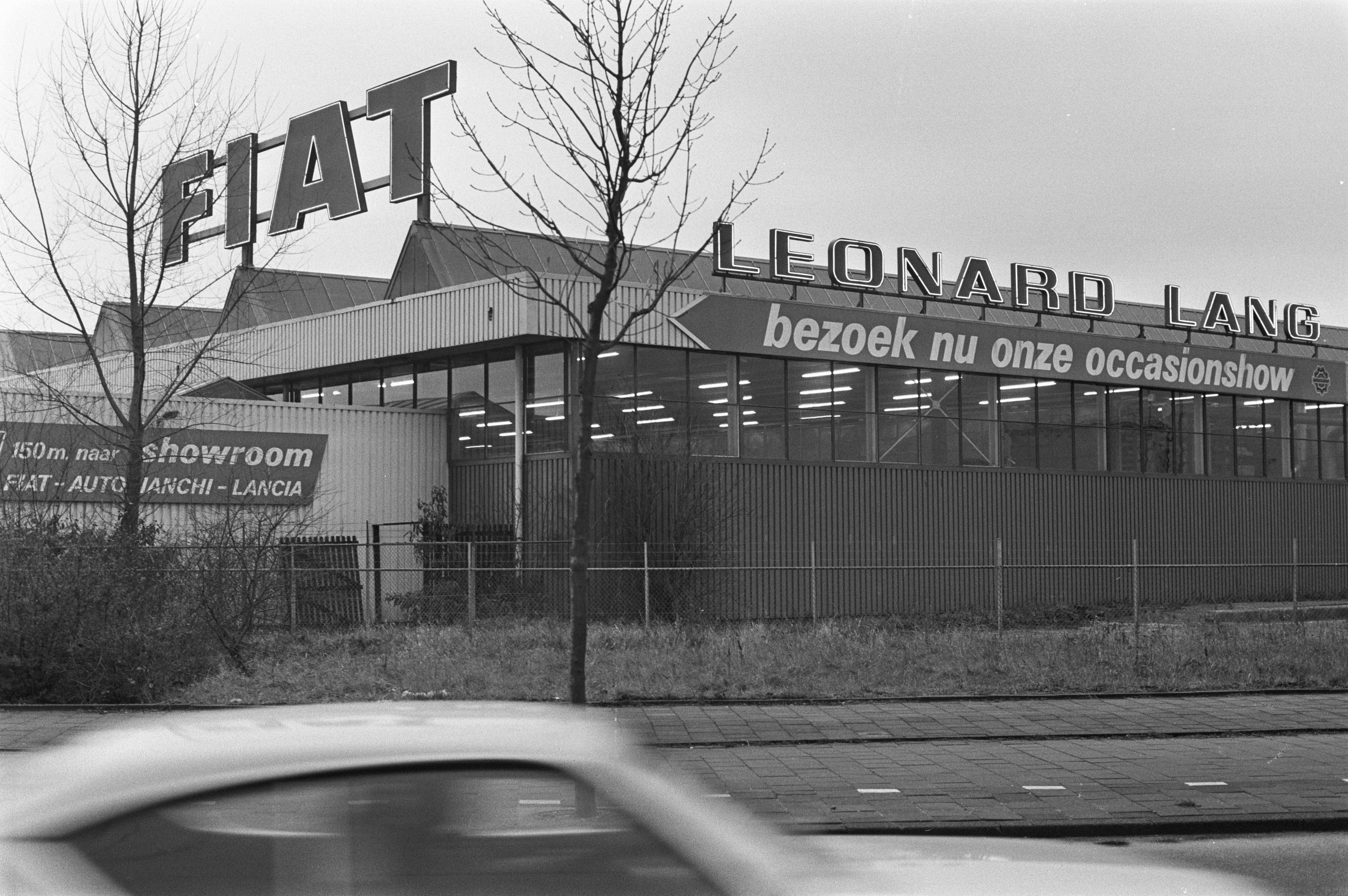 Collectie / Archief : Fotocollectie Anefo Reportage / Serie : Mogelijke ontslagen bij Fiat-importeur Leonard Lang omdat Fiat zelf gaat importeren Beschrijving : Vestiging van Fiat-importeur Leonard Lang in Amsterdam Datum : 7 december 1981 Locatie : Amsterdam, Noord-Holland Trefwoorden : auto-industrie, gebouwen Persoonsnaam : Lang, Leonard Fotograaf : Croes, Rob C. / Anefo Auteursrechthebbende : Nationaal Archief Materiaalsoort : Negatief (zwart/wit) Nummer archiefinventaris : bekijk toegang 2.24.01.05 Bestanddeelnummer : 931-8456